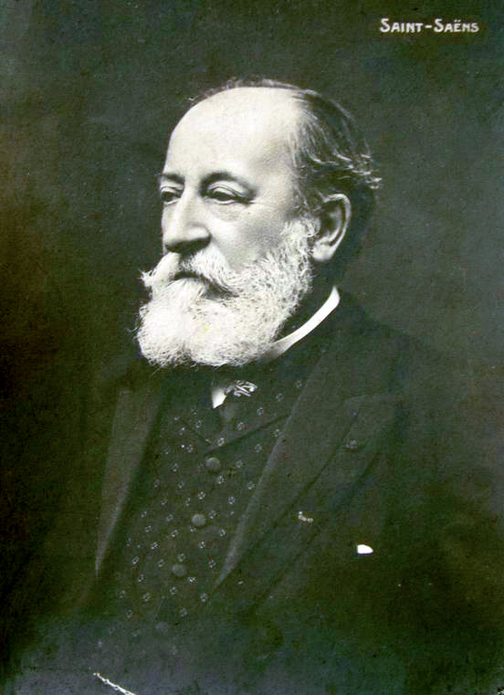 Почтовая карточка (немецкая) Композитор Камилл Сен-Санс (примерно 1905-1910 год)